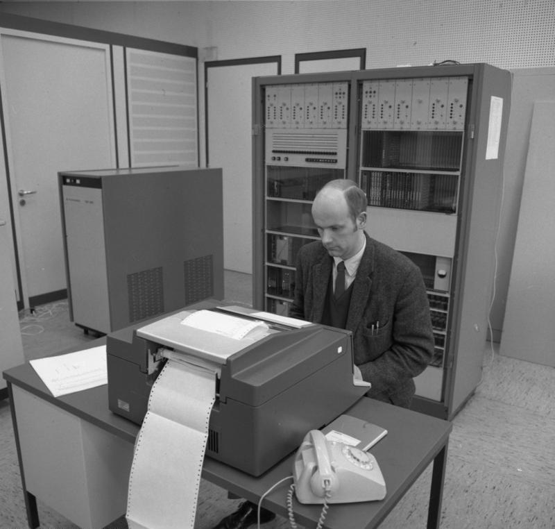 Technische Hochschule Aachen Rechenzentrum